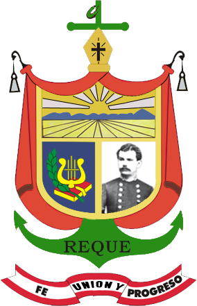 Escudo del Distrito de Reque